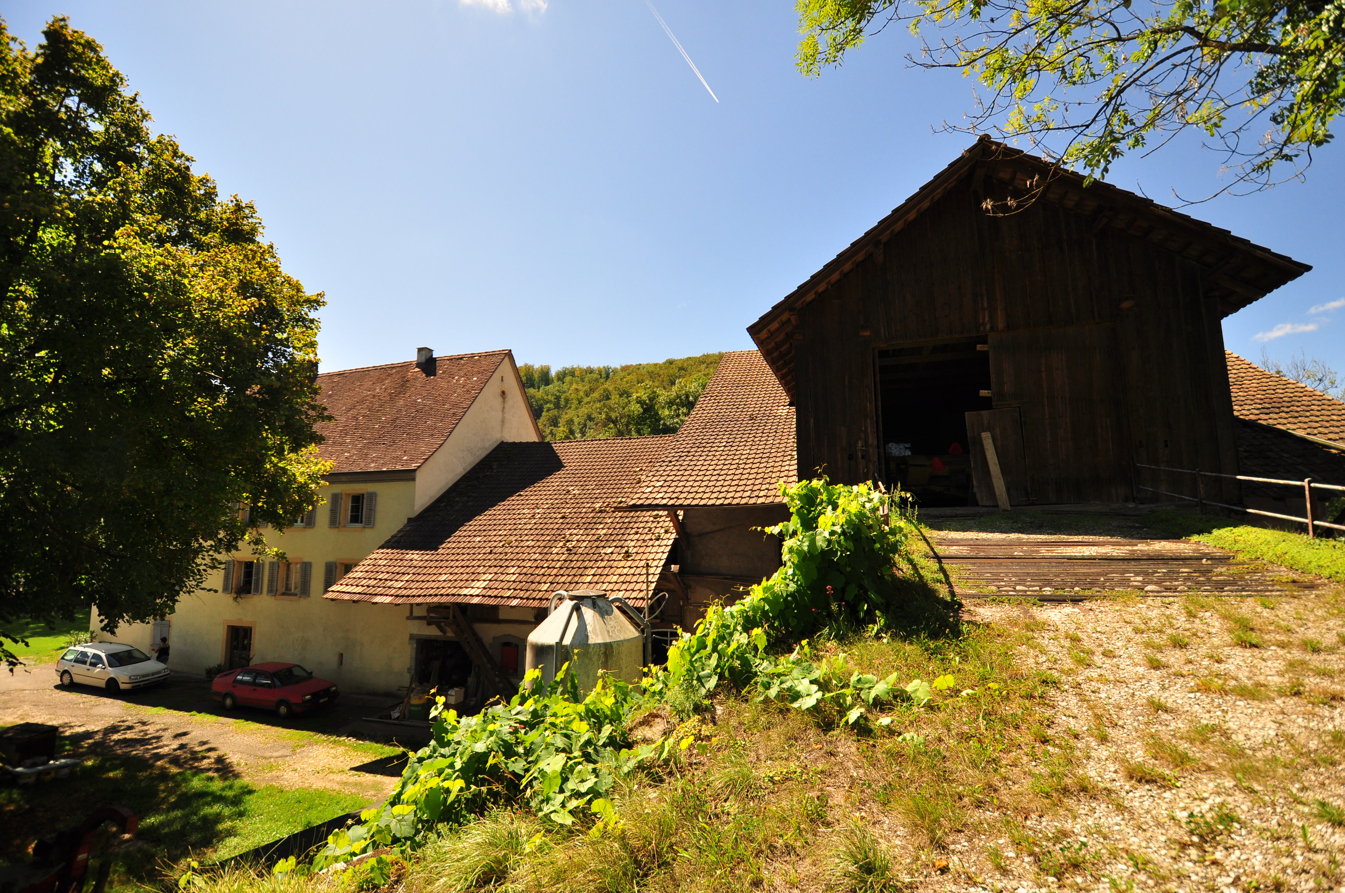 Prairie-Dessous (Villa gallo-romaine) (2)